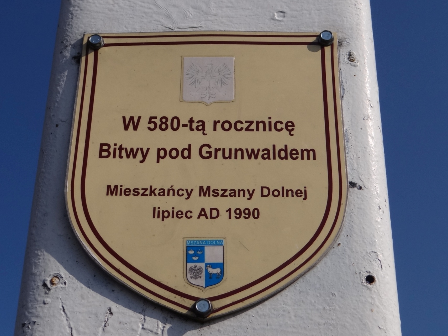 Tablica na krzyżu grunwaldzkim w Mszanie Dolnej